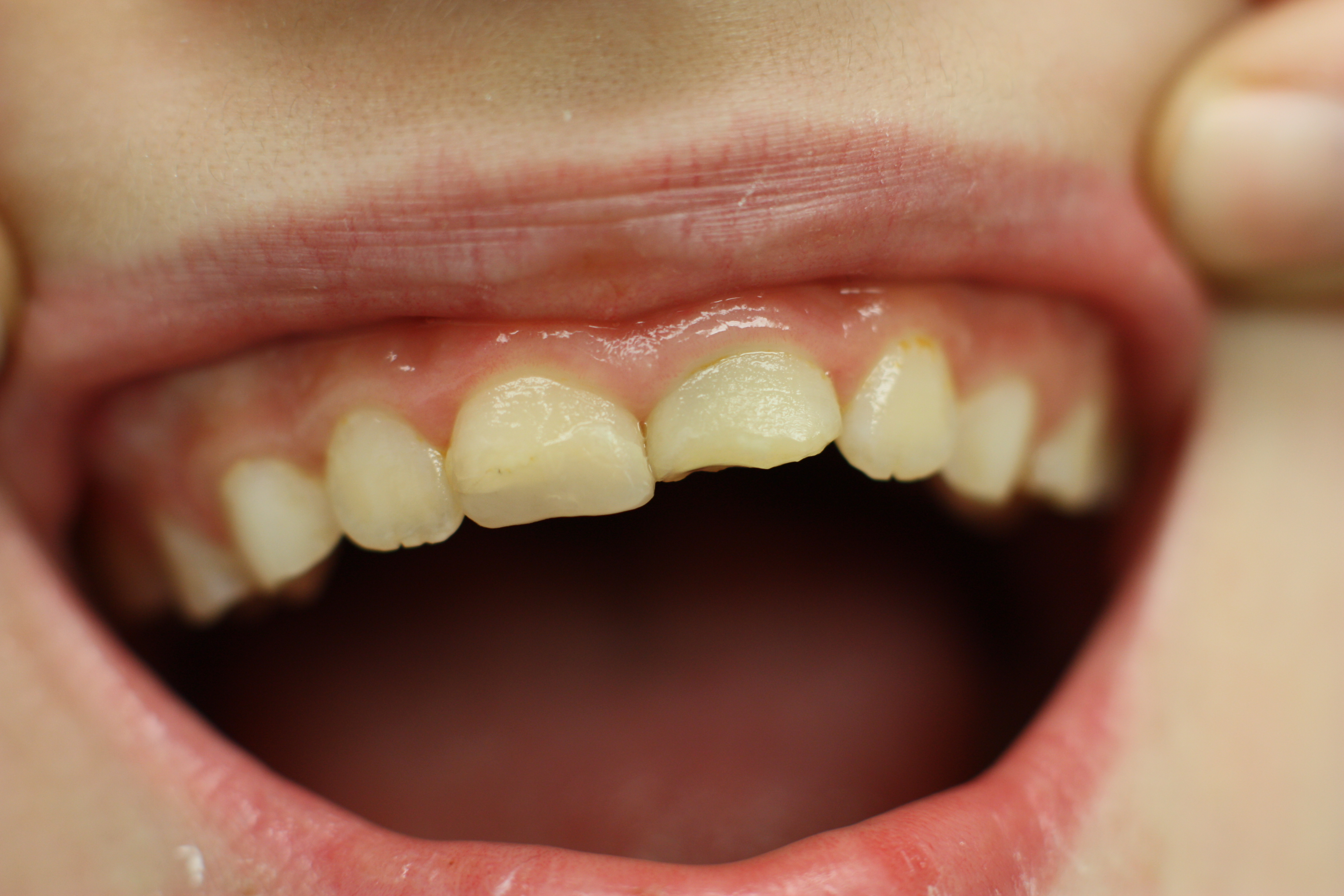 Zahntrauma, frakturierter Frontzahn - Oberkiefer